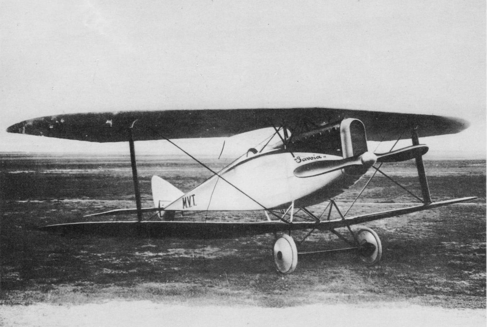 Vickers-Terni MVT, prototipo di caccia monomotore biplano, data e luogo della scatto imprecisati (inizio anni venti).